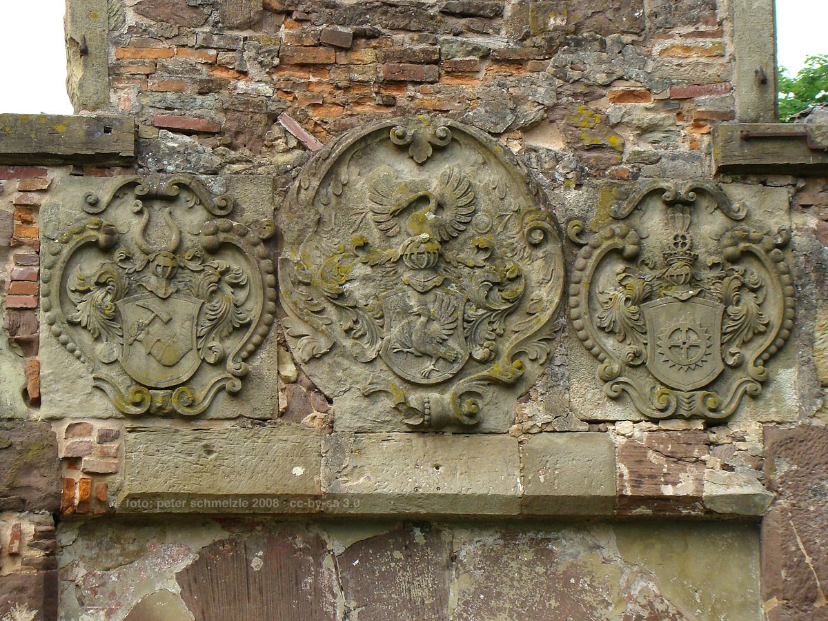 Wappen am Portal des Wasserschlosses in Kraichtal-Menzingen. In der Mitte das Wappen der Freiherren von Mentzingen (Rabe im Schild, Schwan als Helmzier), links das Wappen von Maximilians Frau Margaretha Elisabeth Schaffelitzki von Muckadell (in Blau einen silbernen geharnischten Arm, einen Hammer haltend), rechts das Wappen von Benjamins Frau Sophia Charlotte Klenke von Renckhausen (in Silber ein schwarzes Kammrad mit vier Speichen).